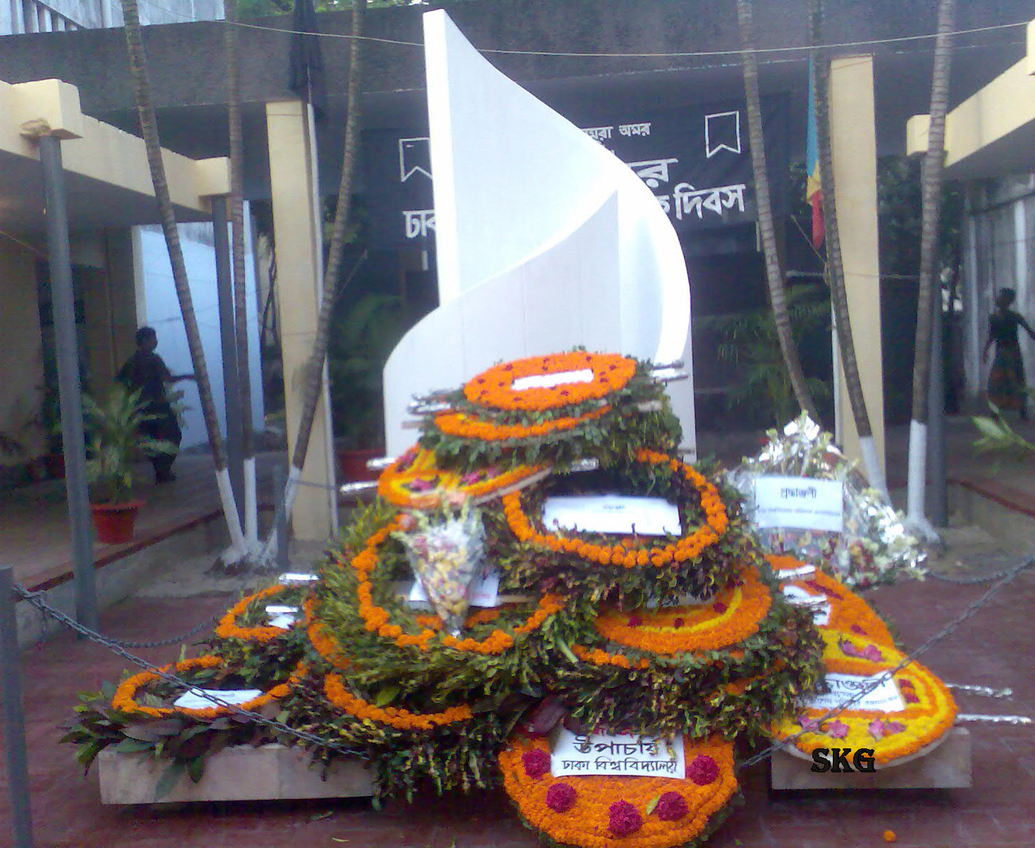 জগন্নাথ হলের ছাদ ধসে নিহতদের স্মরণে নির্মিত স্মৃতিসৌধ।